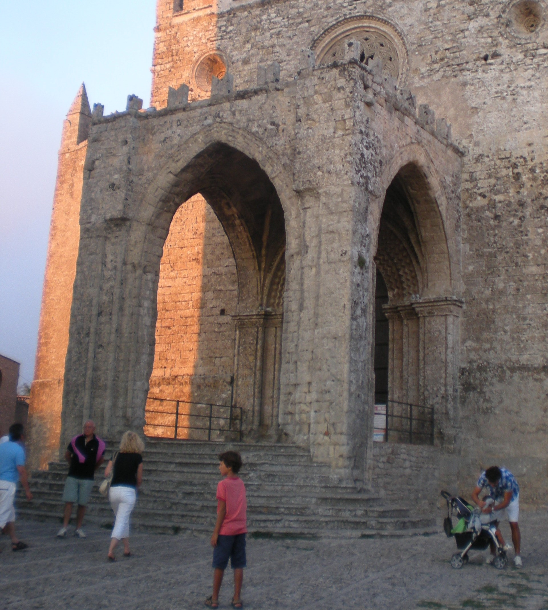 Erice (TP) - Pronao e scalinata della Chiesa Matrice